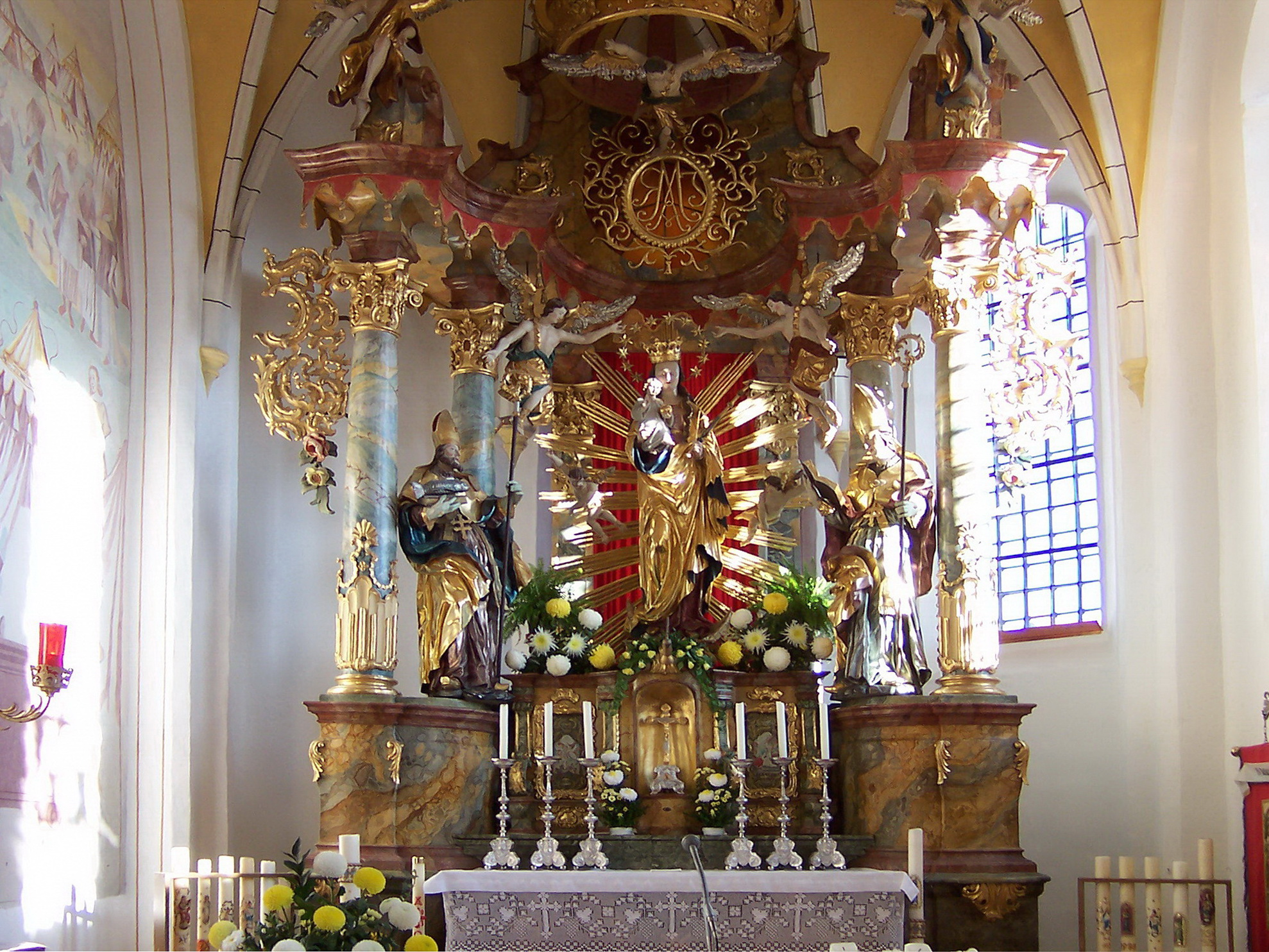 Landshut, Frauenberg 14. Katholische Kirche St. Mariä Heimsuchung. Chorraum mit Rokoko Hochaltar um 1760. Stattlicher, durchbrochener Aufbau mit vier Säulen und lebensgroßen Seitenfiguren.